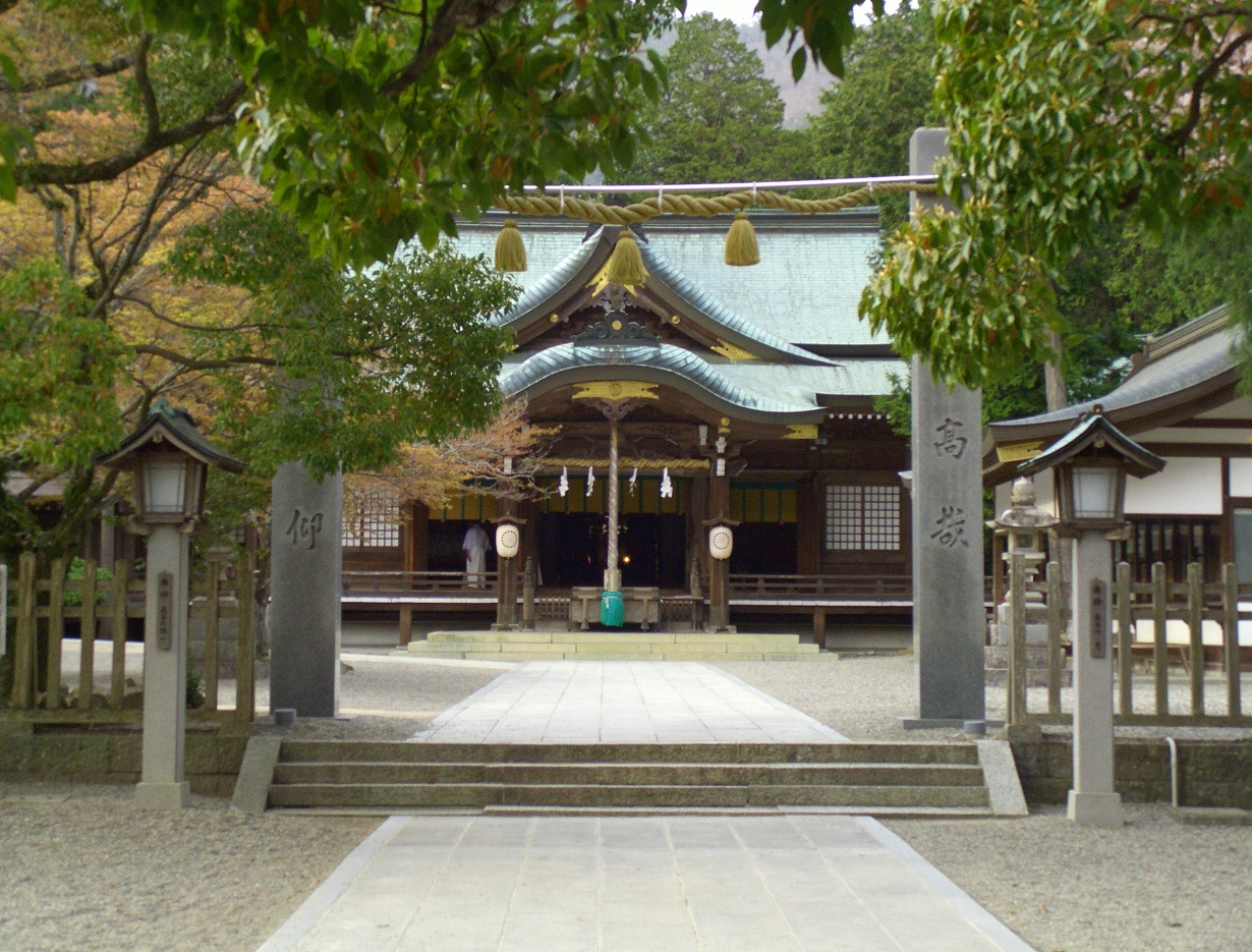 2006年8月6日本人撮影 大麻比古神社